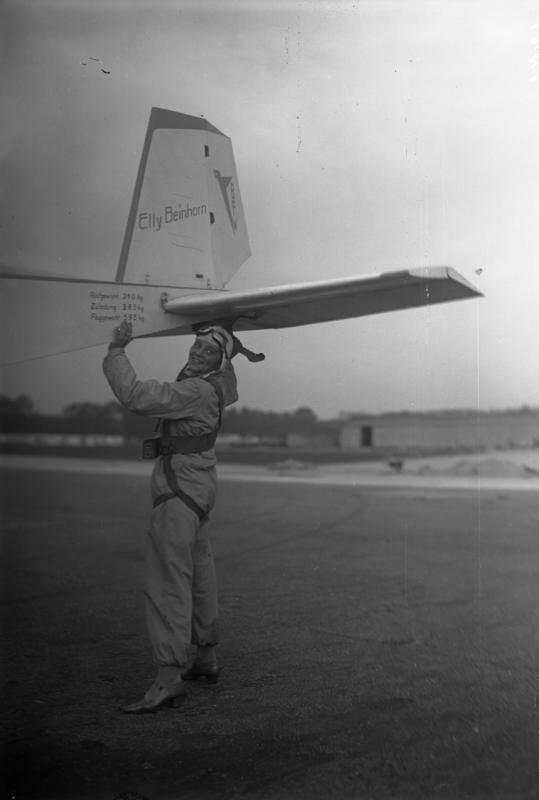 Der Hindenburgpokal für die bekannte deutsche Fliegerin Elly Beinhorn! Die bekannte deutsche Fliegerin Elly Beinhorn, erhielt den Hindenburgpokal zur Förderung sportlicher Leistungen mit leichten Motorflugzeugen in Anerkennung ihrer Leistungen.